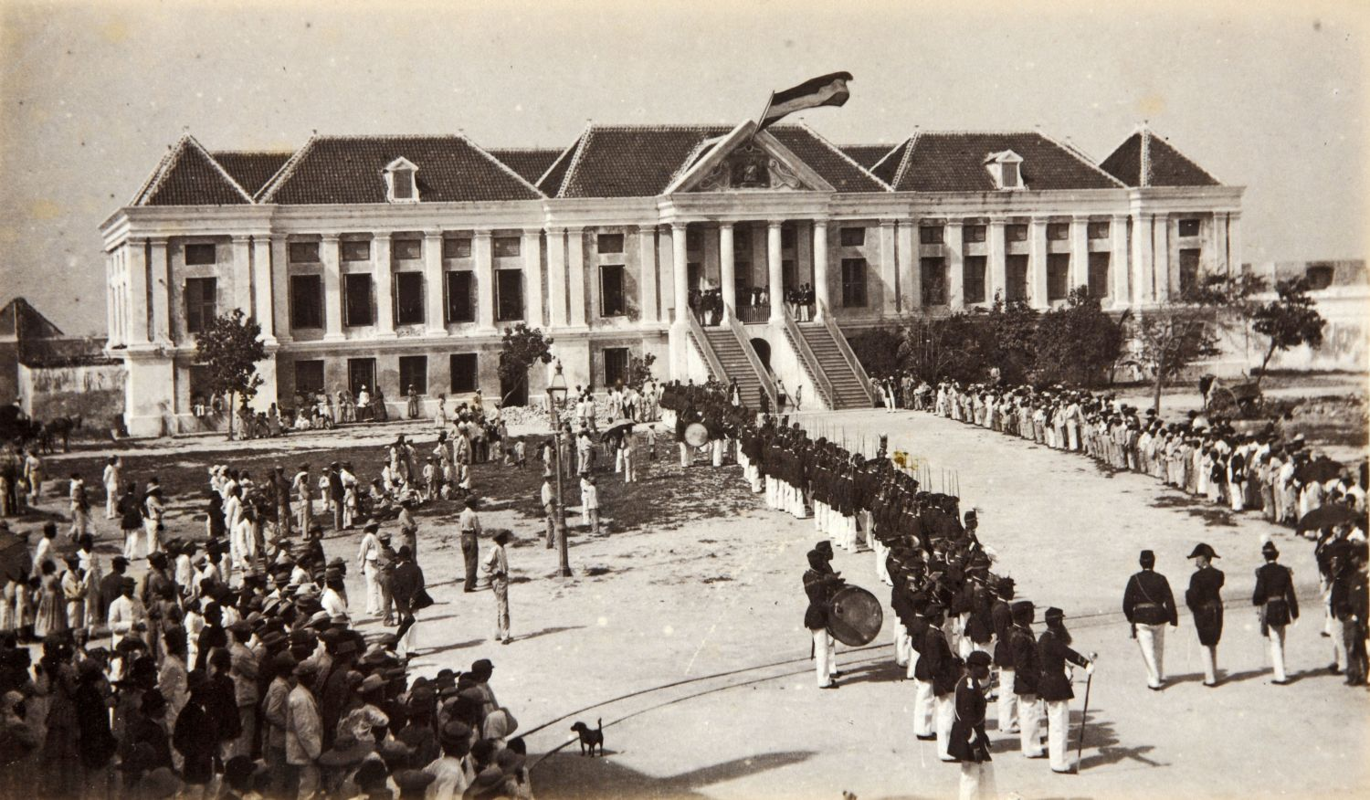 Foto.